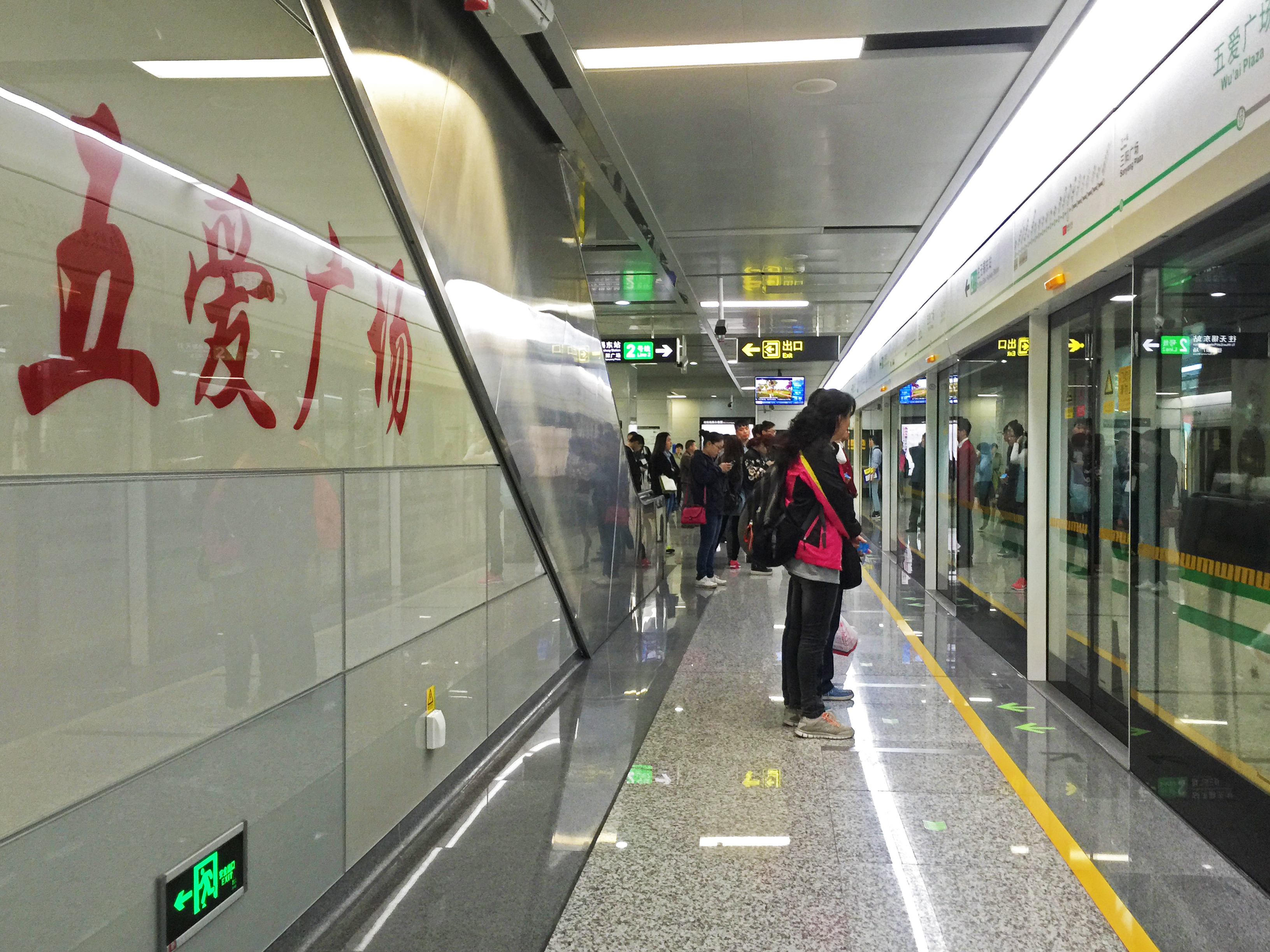 无锡地铁2号线五爱广场站站台